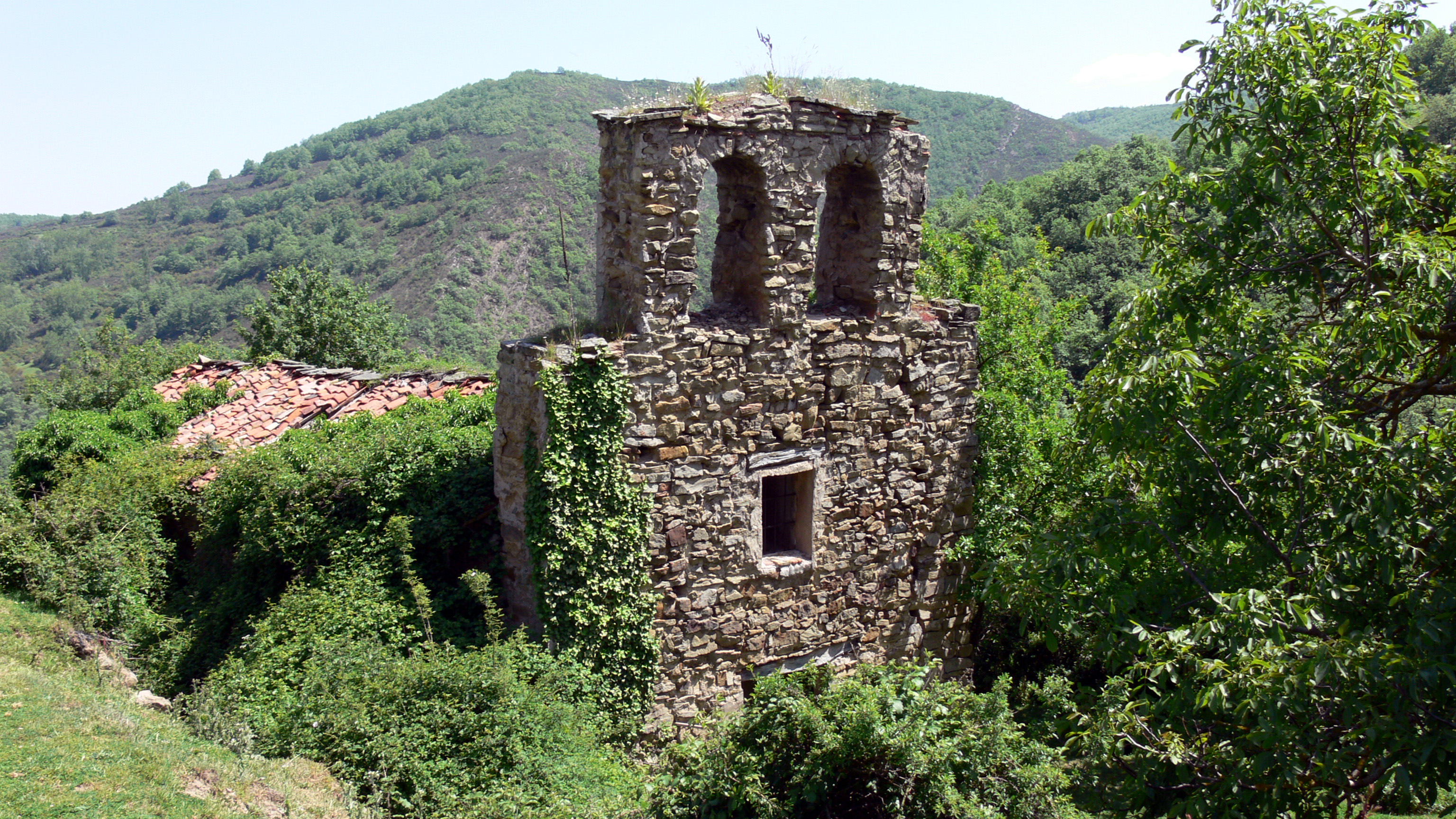 Iglesia de Santa María en Bucesta, Santa Engracia del Jubera (La Rioja, España).